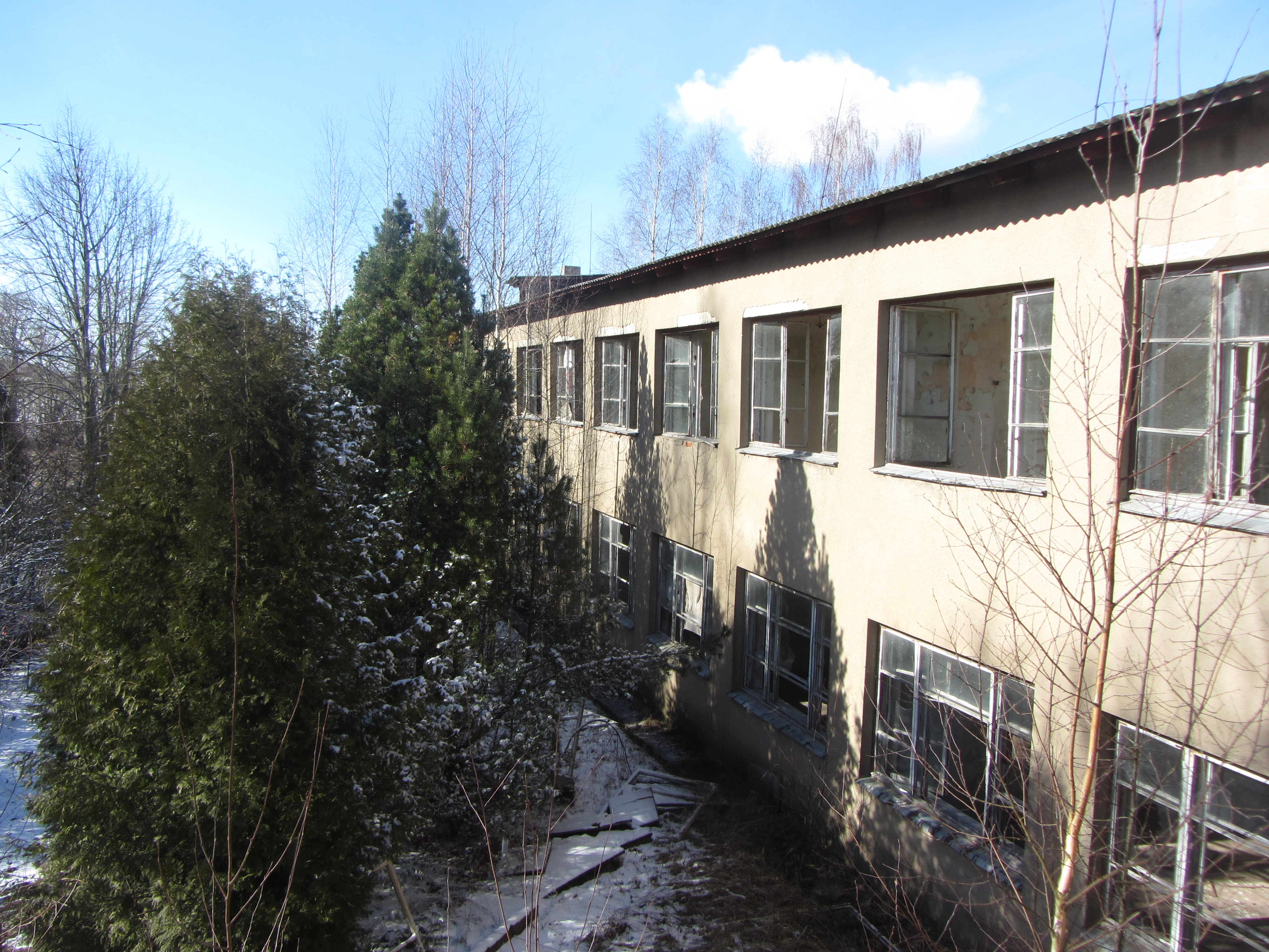 Kunigiškiai II, Lithuania